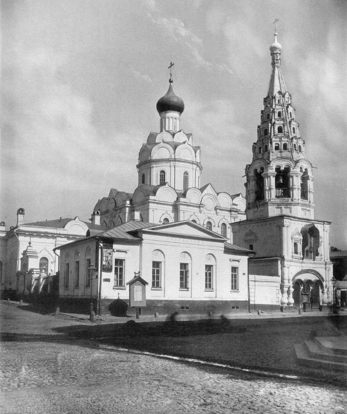 a historical photo of the Arbat Street in Moscow / Церковь Николая Чудотворца (Явленного) на Арбате